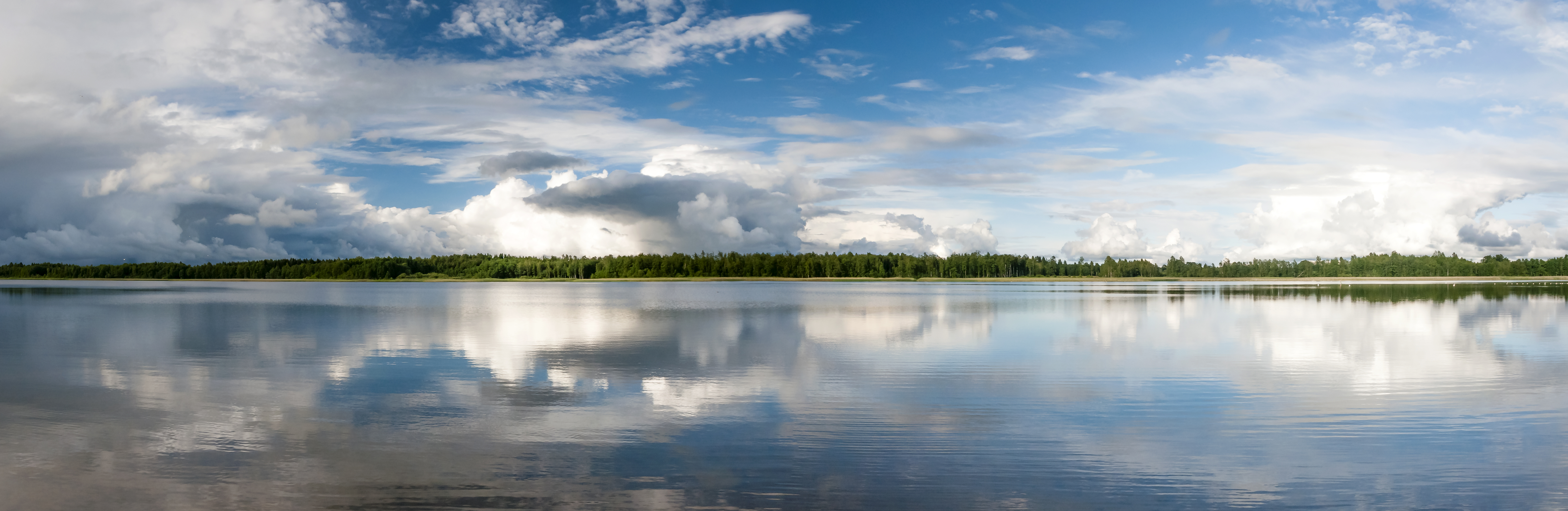 Куремаа (эст. и выруск. Kuremaa järv) — озеро в Эстонии в волости Паламусе в 2 км к северу от посёлка Паламусе. Площадь озера — 397 га. Это 11 по величине озеро в Эстонии и второе по величине в уезде Йыгевамаа после озера Саадъярв.